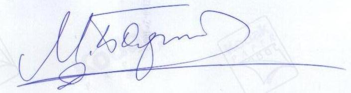 Автограф Михаила Боярского